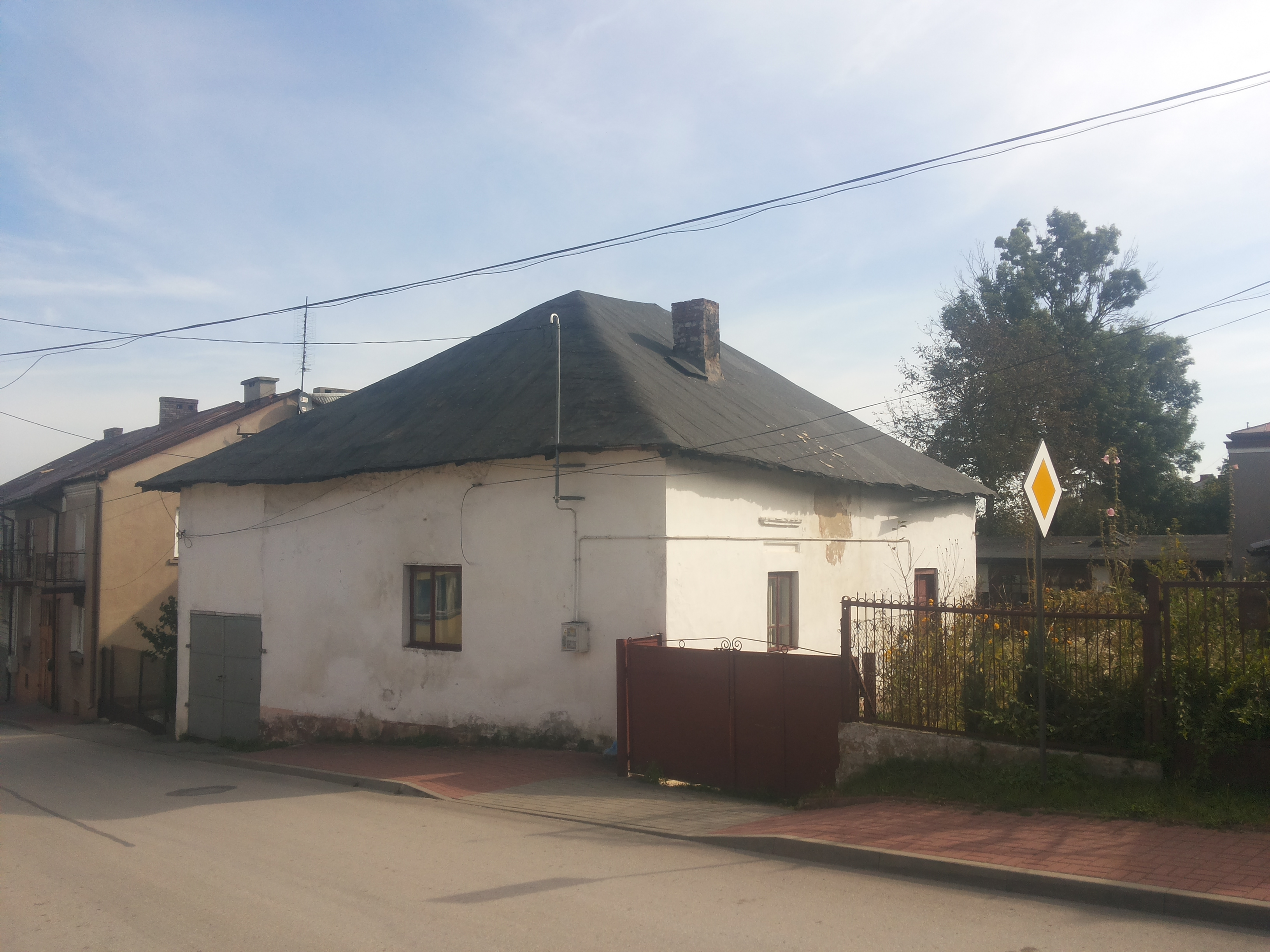 Chęciny, dom, XVI, XIX, XX